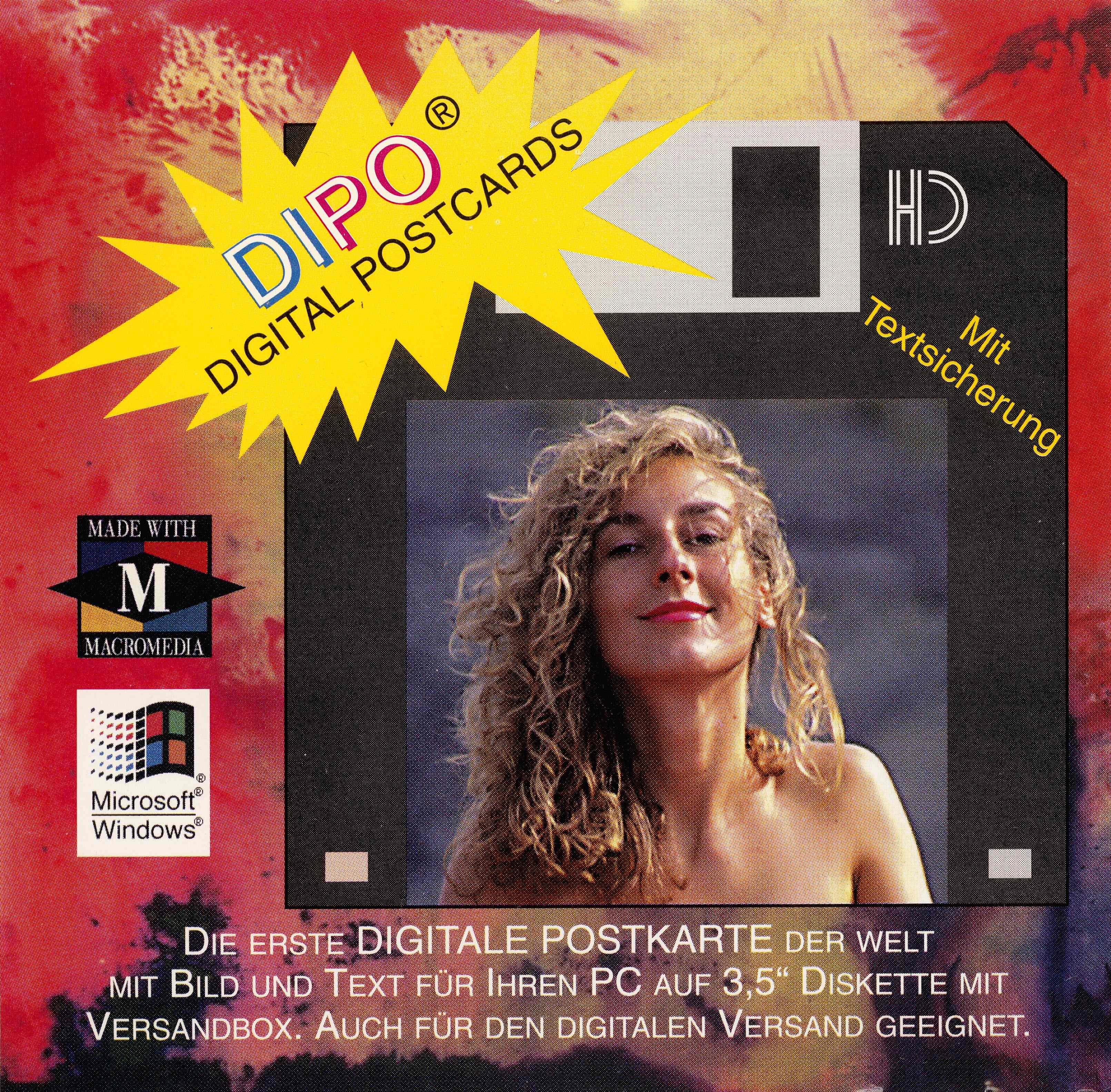 Cover der im deutschen Handel erhältlichen Digitalen Postkarte